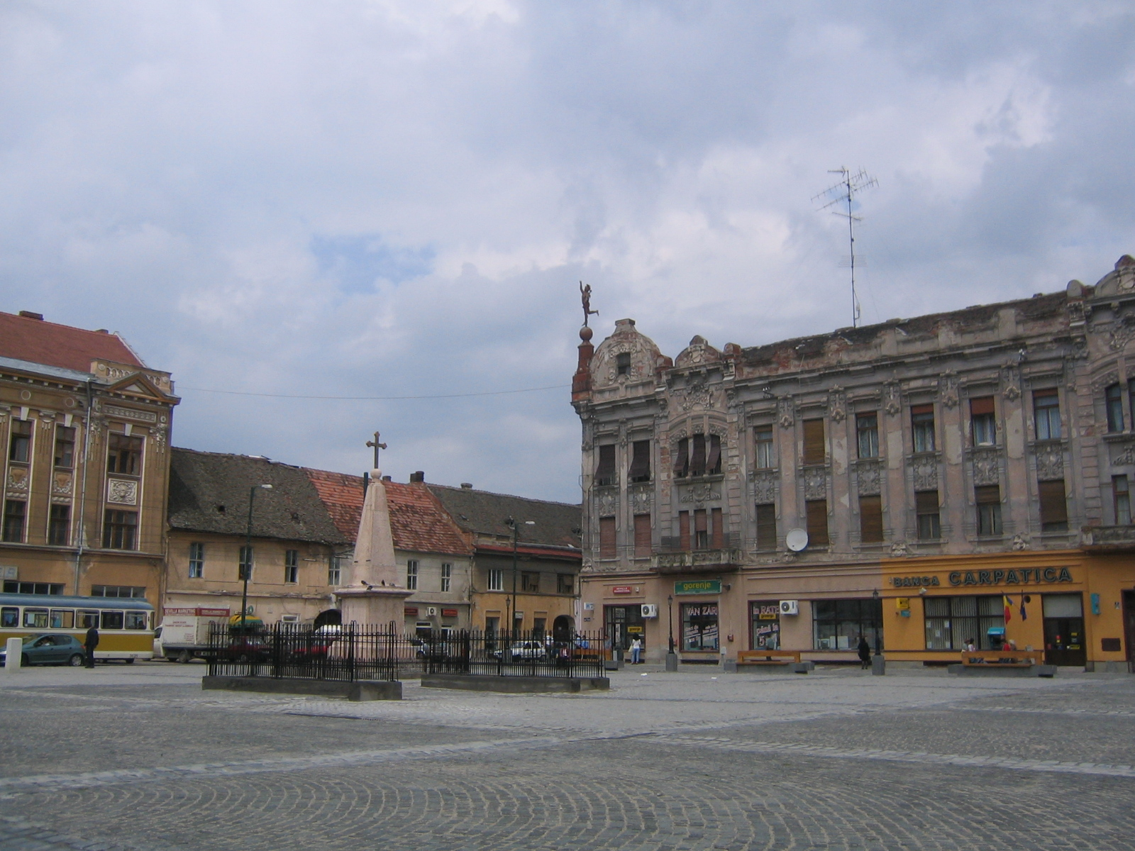 Piata Traian, cartierul Fabric, Timisoara, Romania